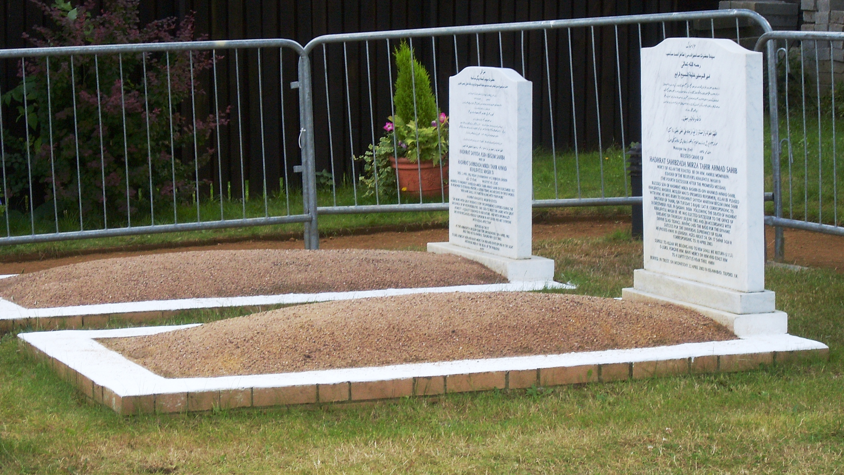 Vorne das Grab von Hadhrat Mirza Tahir Ahmad (gest. 19. April 2003)und hinten von seiner Frau Sayyida Asifa Begum (gest. 3. April 1992)